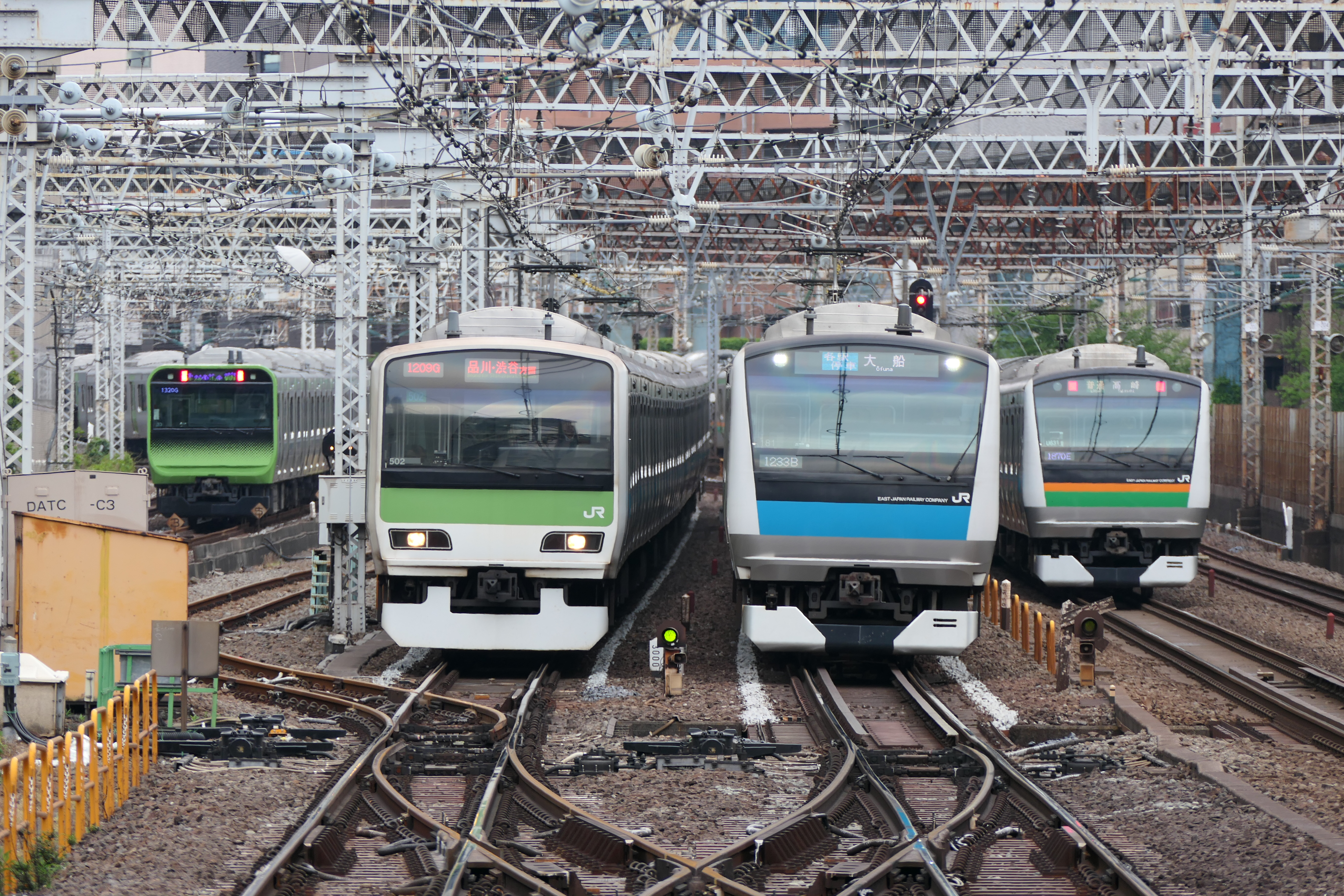 東京都内の在来線(山手線・京浜東北線・東海道本線)